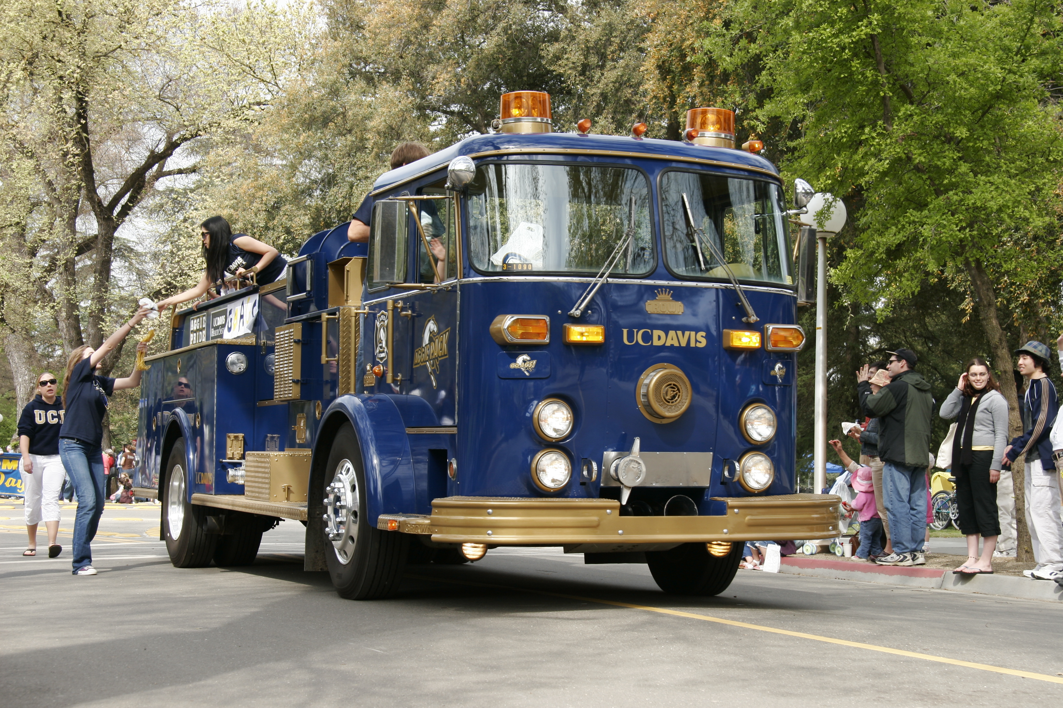 Parade - UCD Firetruck